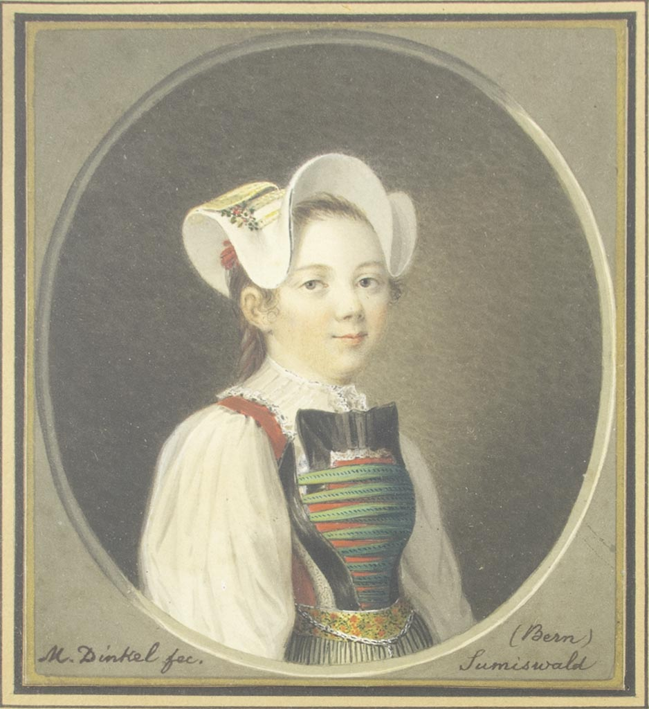 Markus Dinkel, Junge Schwarzwälderin in hauensteiner Tracht, Gouache um 1800. Irrige spätere Zuschreibung an Sumiswald. Provenienz: Inventar des Schlosses Mauensee,Sammlung Comte de Pourtales, Versteigerung im Zunfthaus zur Meise, 26. bis 28. Mai 1932, Zürich, Nummer 996C.